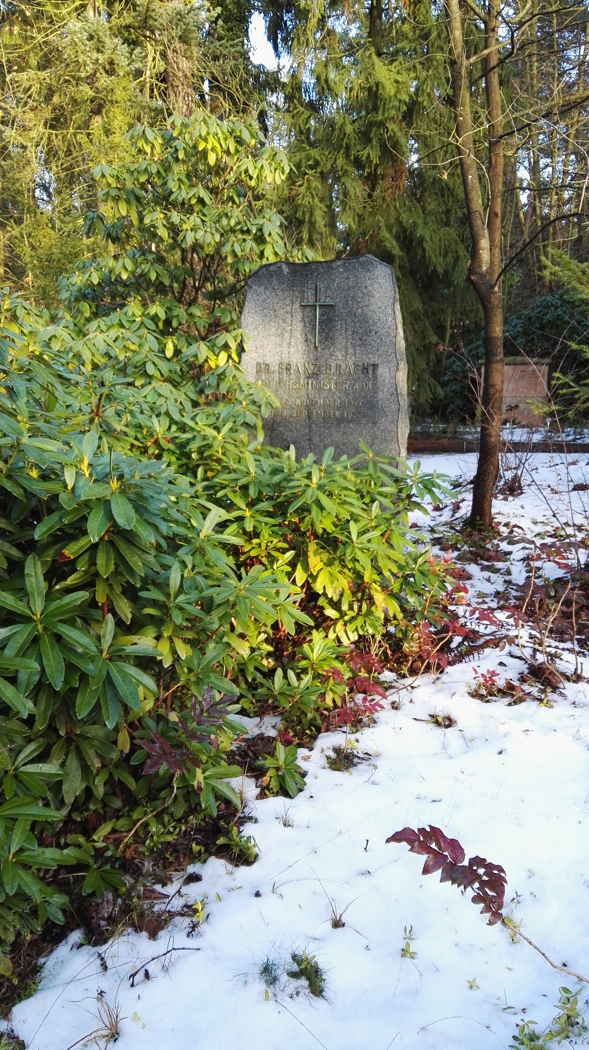 Grab von Franz Bracht auf dem Südwestkirchhof Stahnsdorf